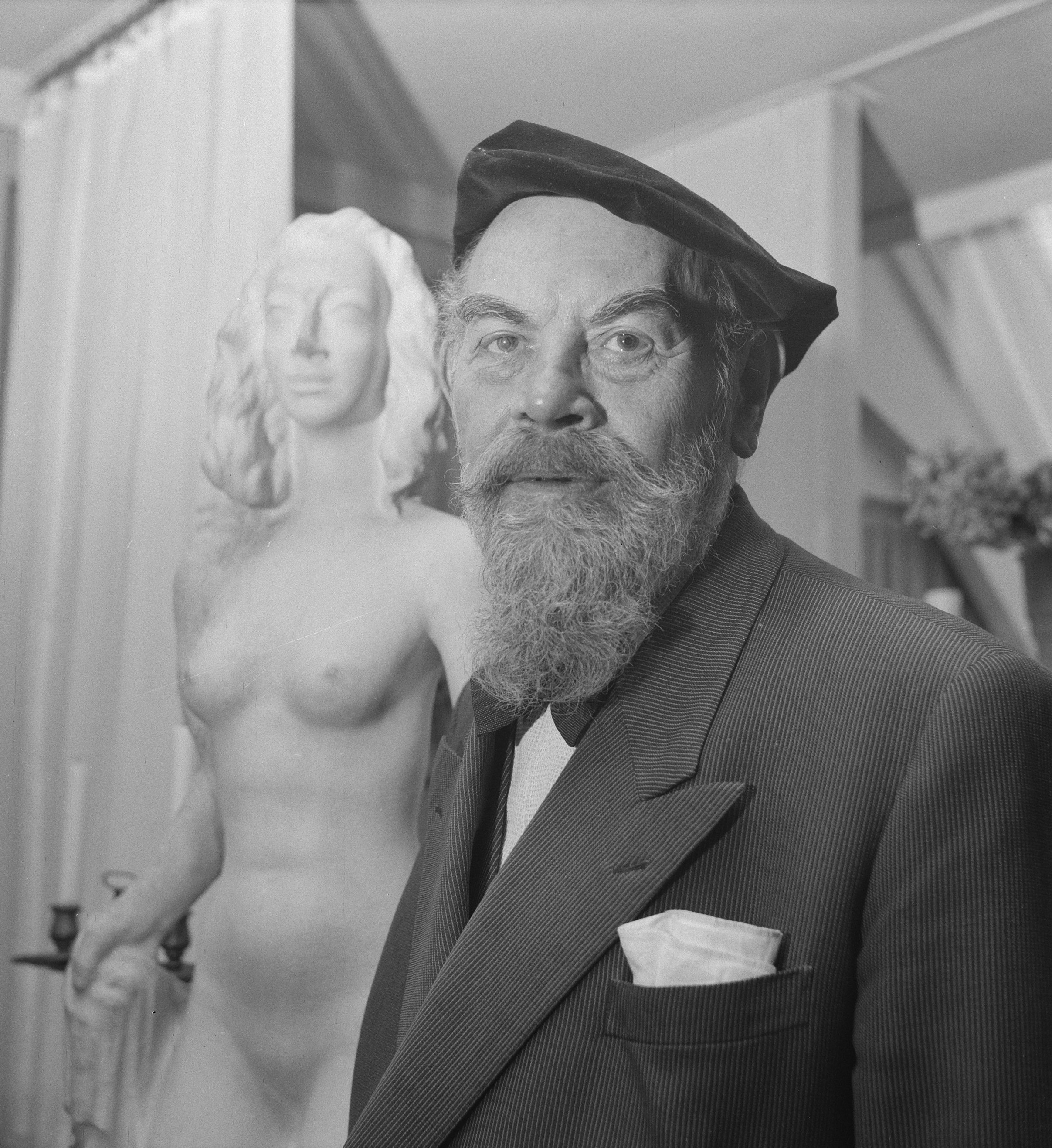 Barend Jordens in 1963